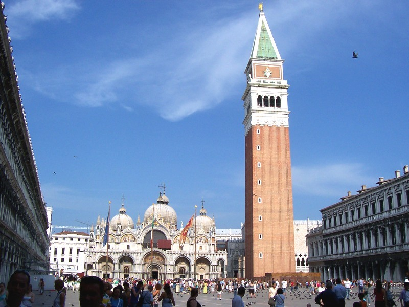 Venezia - Piazza S. Marco